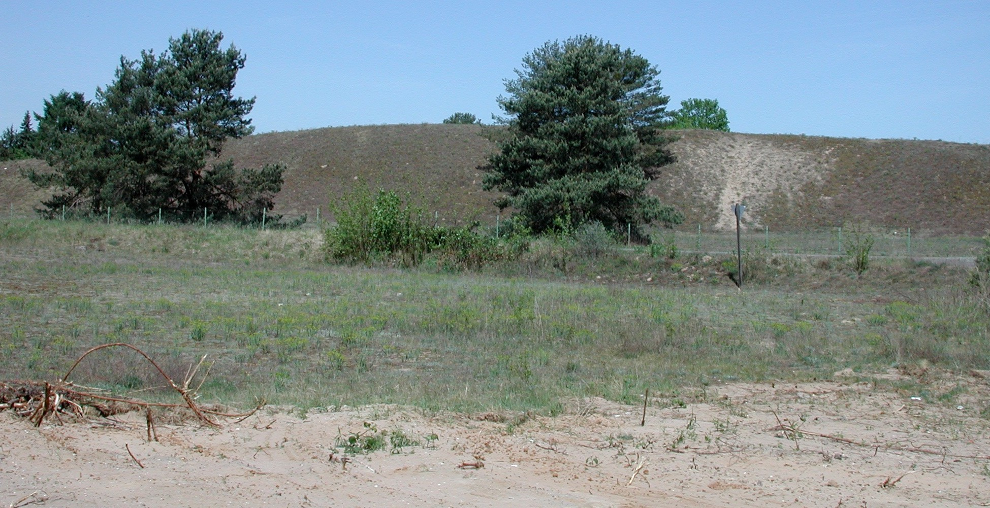 Lebensräume mit sandigen Böden sind ideal für Knoblauchkröten.